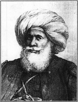 Muhammad Ali Pascha